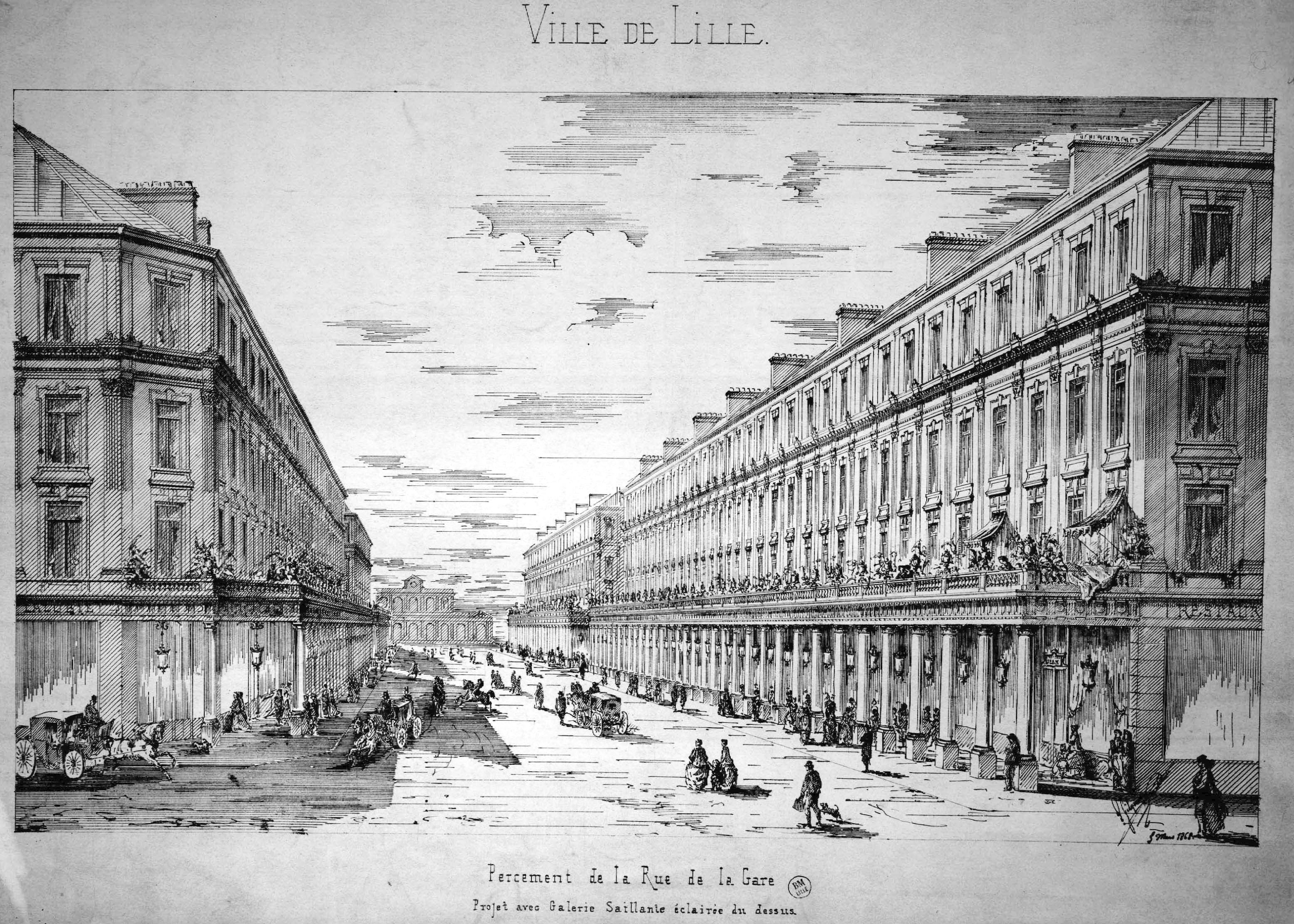 Projet de Louis Gilquin, présenté en 1868 pour la nouvelle rue de la Gare dans la ville de Lille.